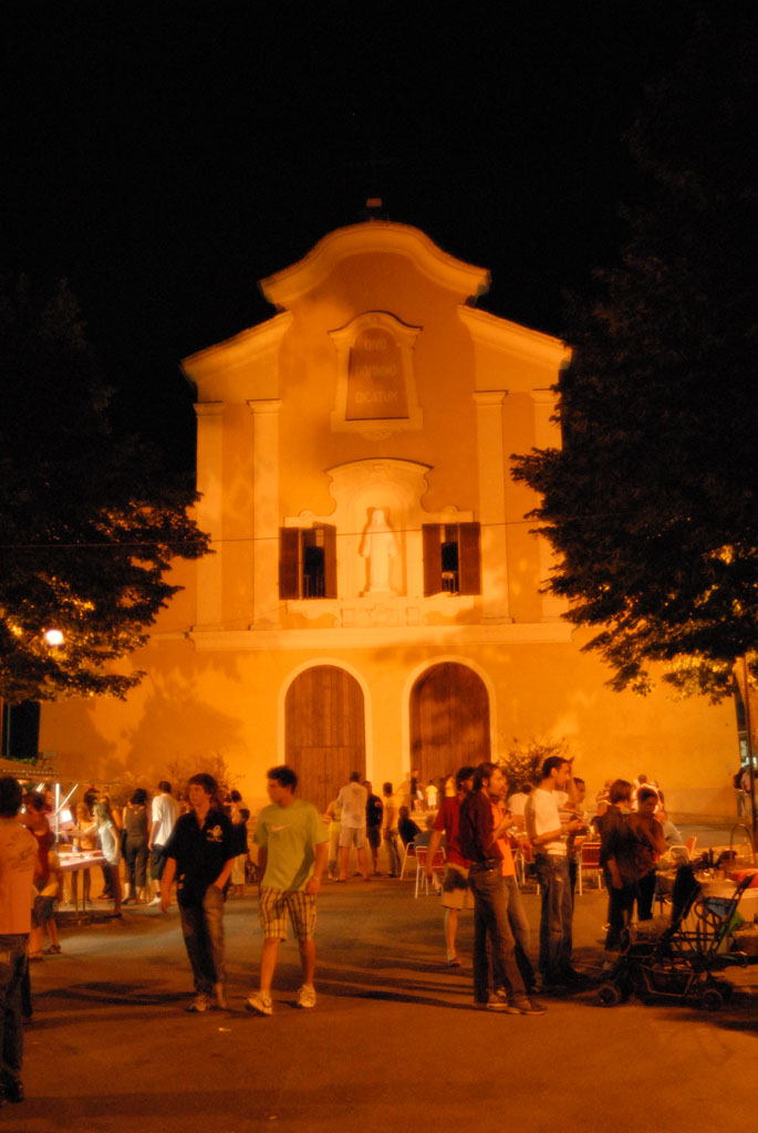 Chiesa di San Donnino martire di Massenzatico, Reggio Emilia - San Donnino Church